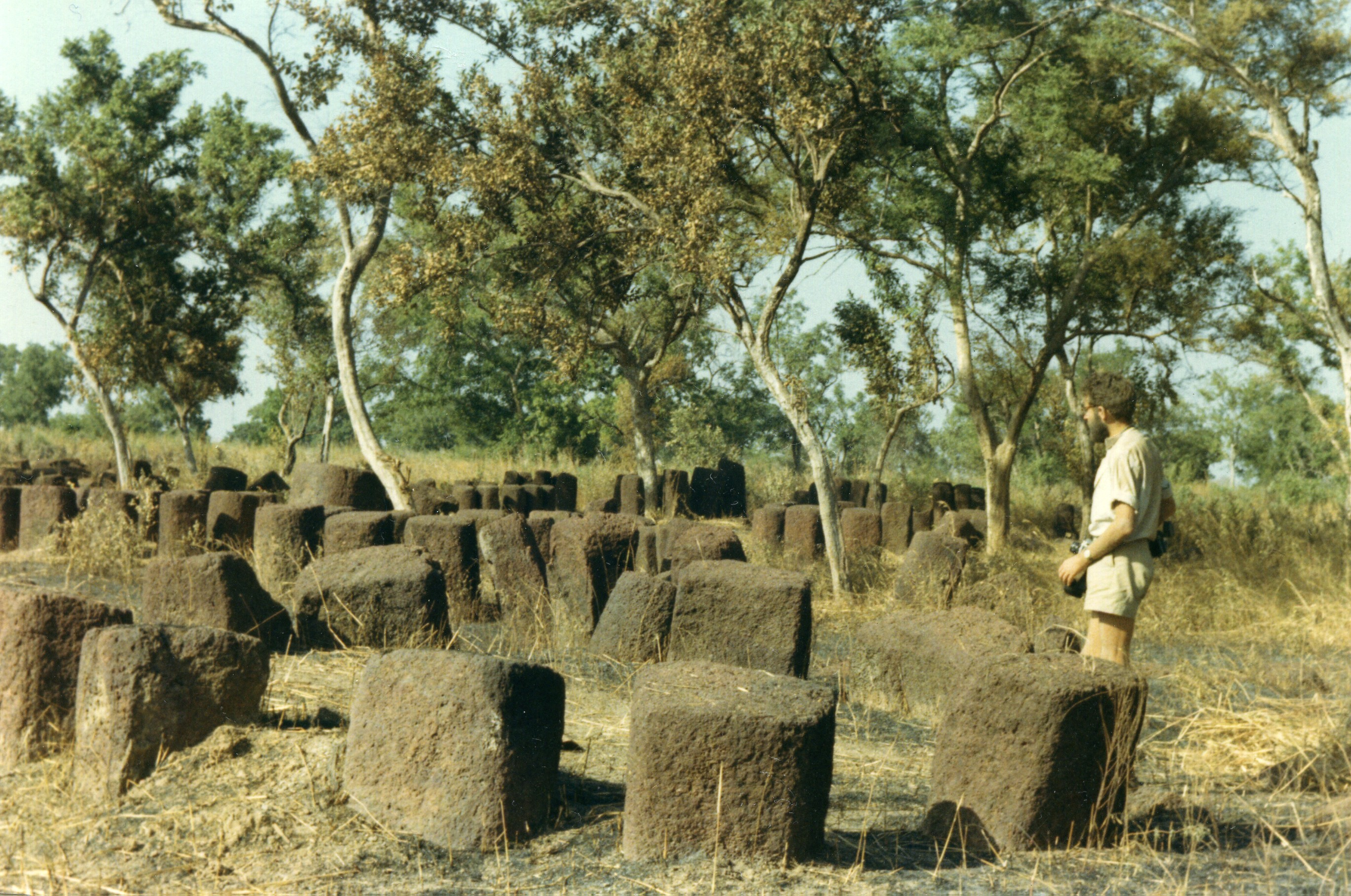 Die Senegambische Steinkreise liegen in einem Band von 100 Kilometer Breite und 350 Kilometer Länge, sie umfassen mehr als 1000 Monumente entlang des Flusses Gambia